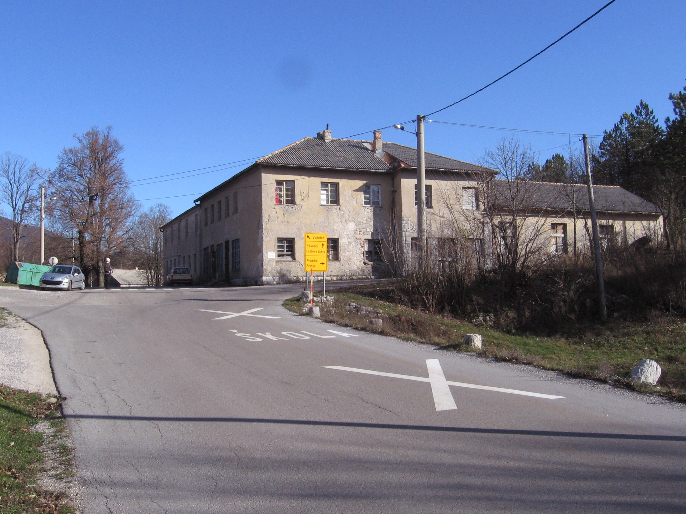 Krivi Put